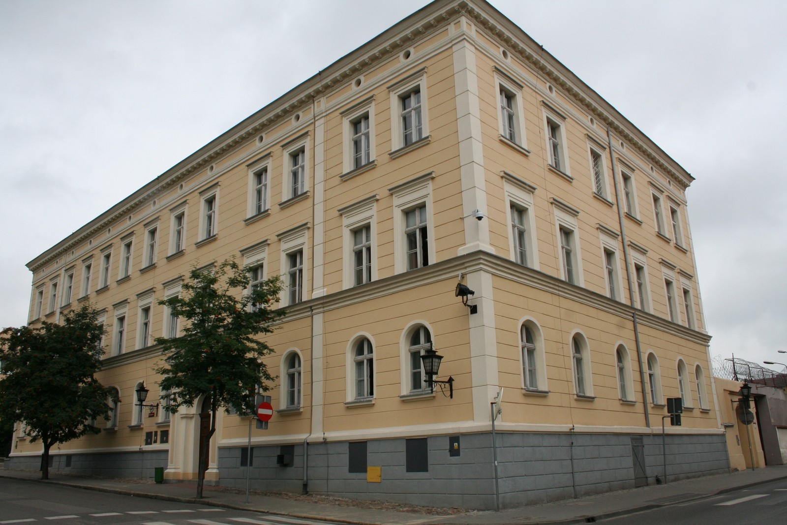 Chełmno, ul. Toruńska 3 - dawne seminarium duchowne ks. misjonarzy, obecnie sąd rejonowy, 4 ćw. XVII, 1 ćw. XVIII w., 1827-1828 (zabytek nr A/526)